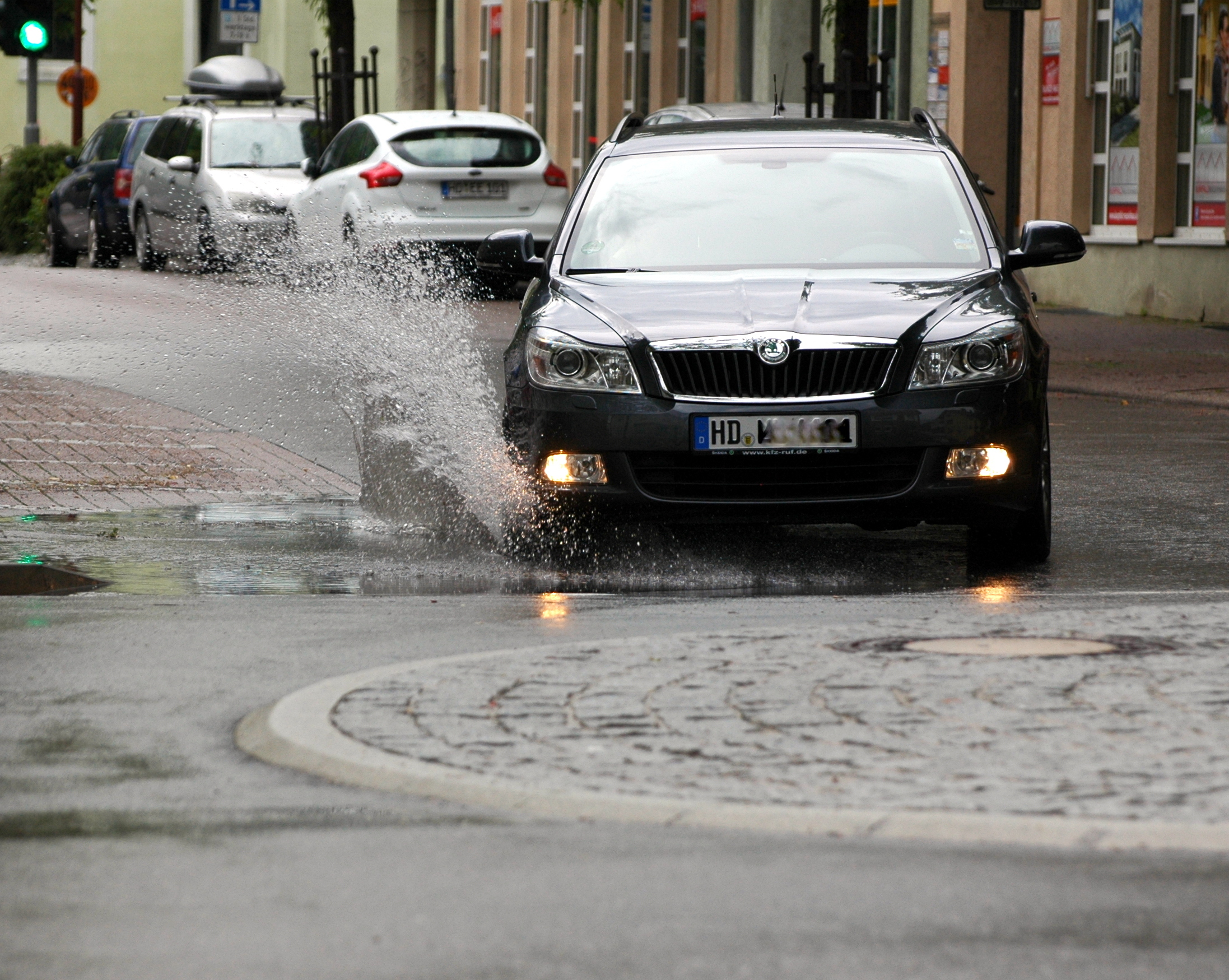 Bammental nach Regen